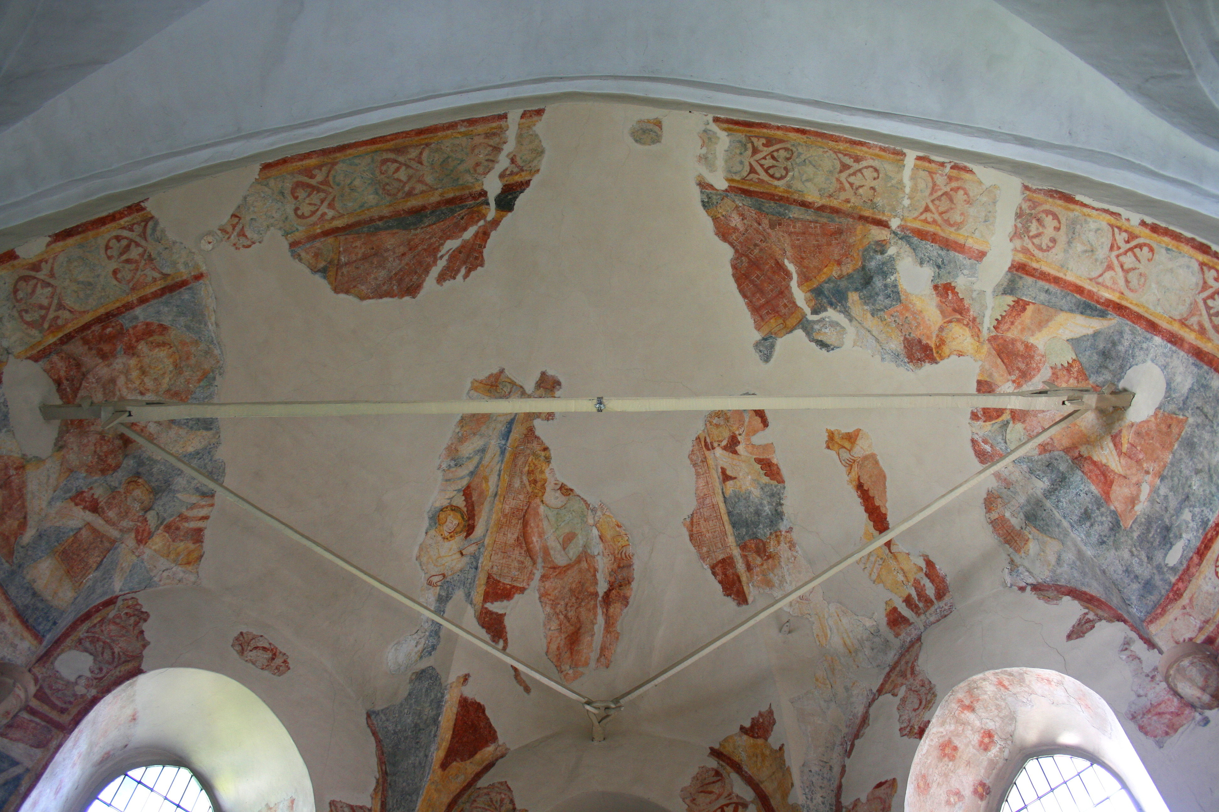 Evangelische Kirche Marienhagen in Wiehl-Marienhagen